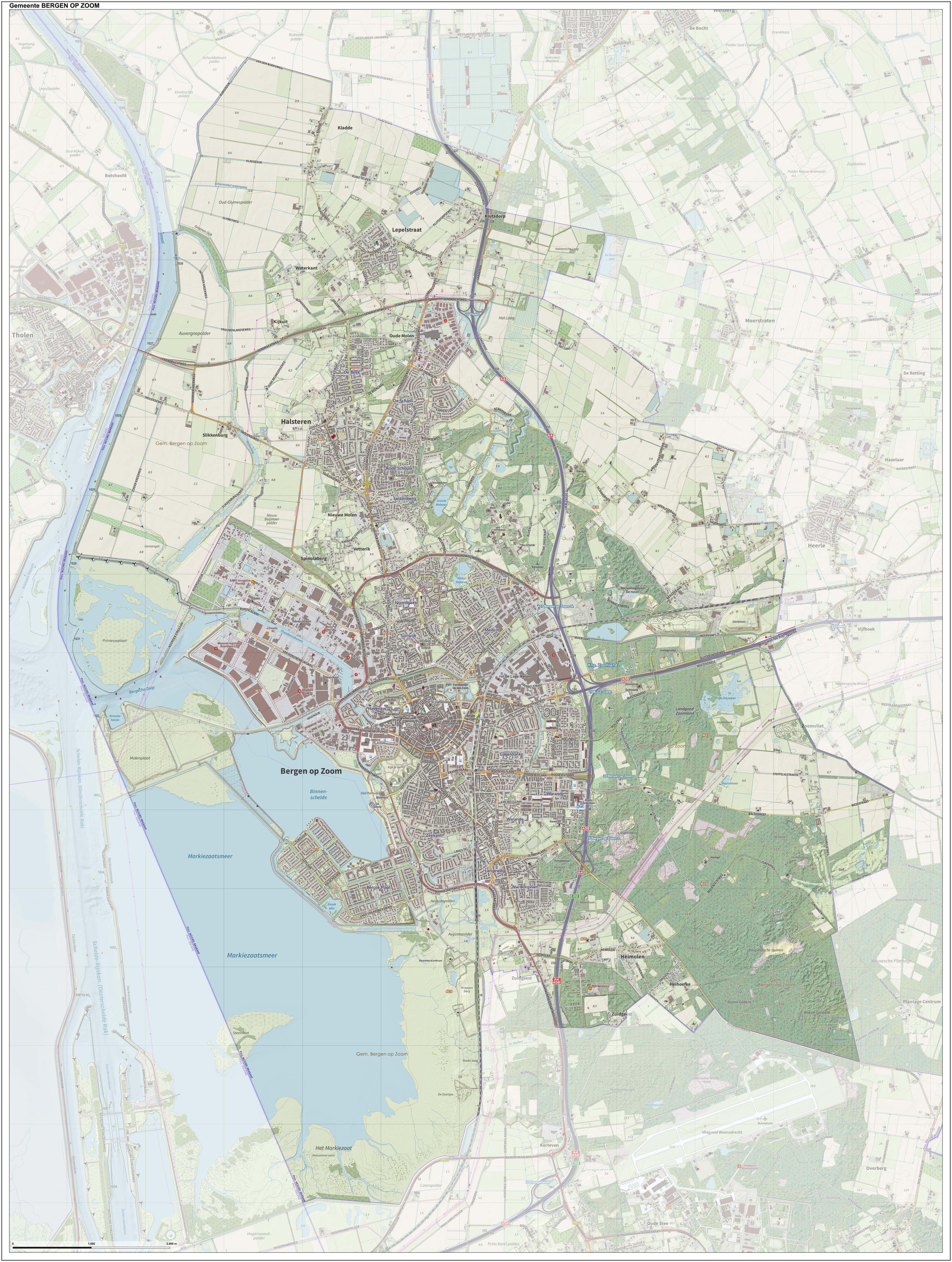 Topografische gemeentekaart. Resolutie: 400 pixels/km. Kaartbeeld samengesteld uit de open geodata van de Top10NL en Top25namen Basisregistratie Topografie, Creative Commons BY licentie. Gebouwvlakken uit open geodata BAG extract. Wegen uit de OpenStreetMap, OpenStreetMap community. Schaduwreliëf uit de Actuele Hoogtekaart AHN2, RWS en Waterschappen. Samenstelling en kleurenschema: Jan-Willem van Aalst, met QGIS2. Zie ook de Legenda.